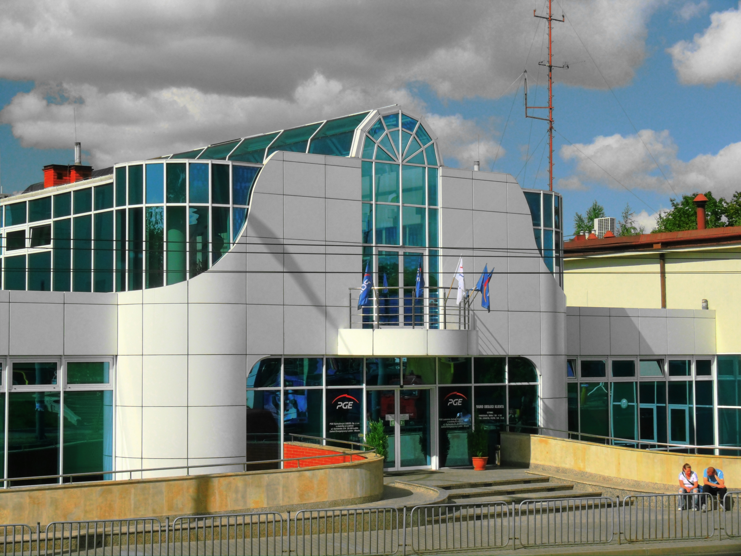 Nowy budynek siedziby Lubelskich Zakładów Energetycznych "Lubzel" S.A.